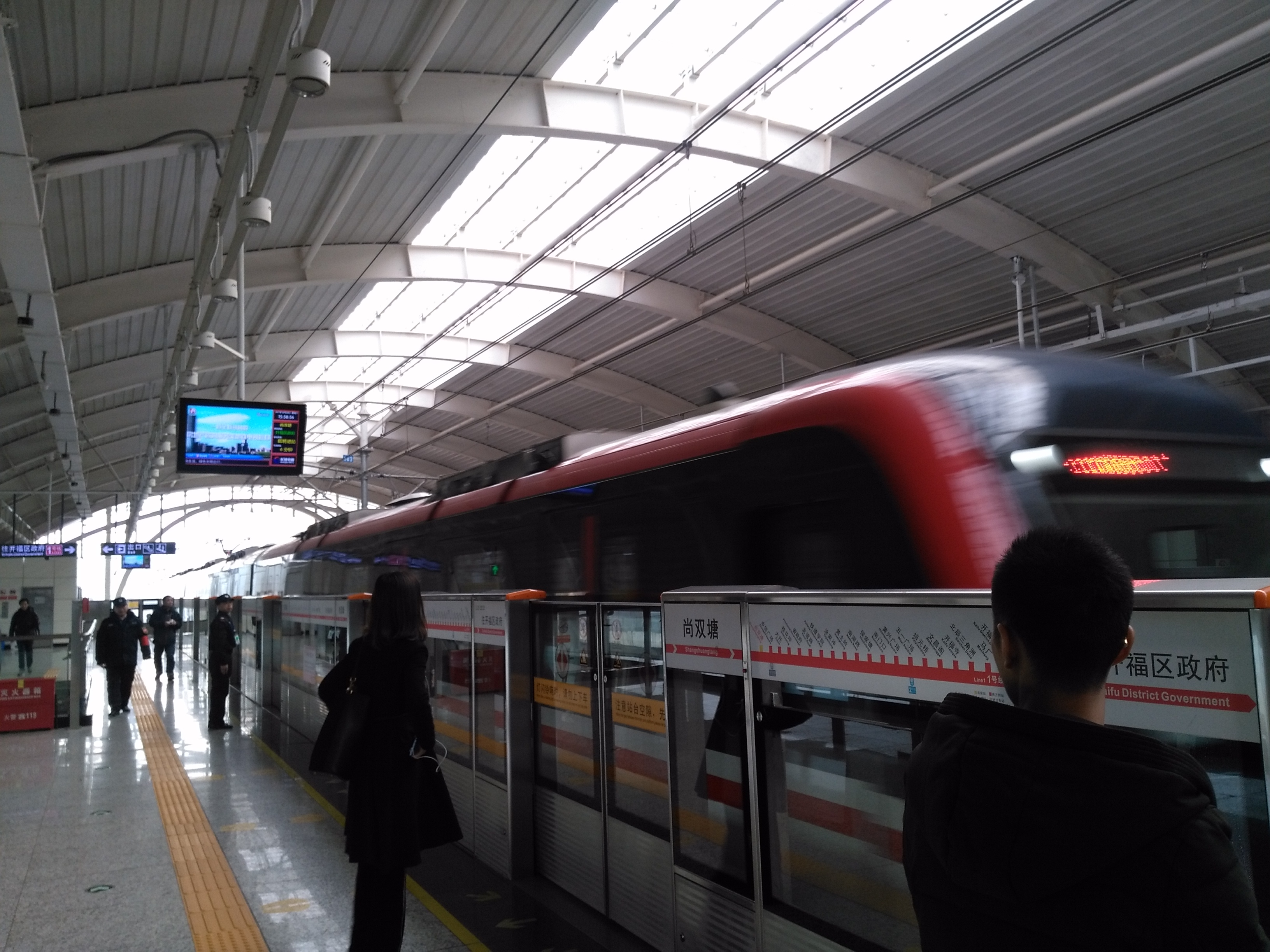 长沙地铁尚双塘车站内一列始发列车